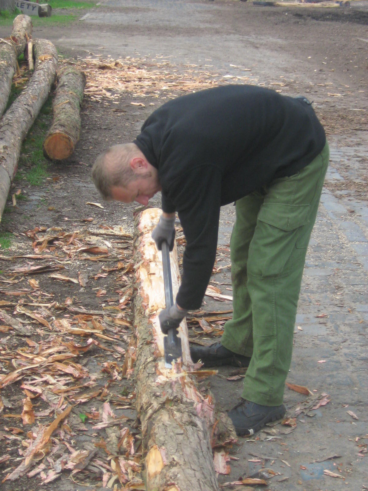 Korowanie